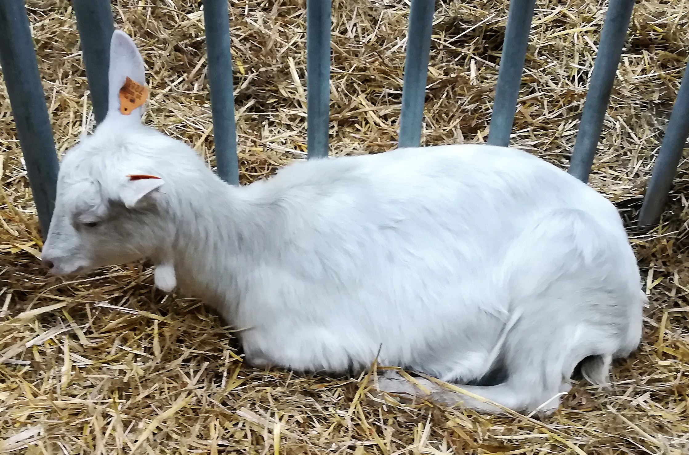 Narodowa Wystawa Rolnicza w Poznaniu na MTP z okazji 100-lecia odzyskania niepodległości. Koza polska biała 7-8 miesięczna.